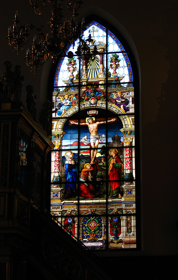 中文（中国大陆）: 塑钢保温窗的窗框剖面，顾震弘摄于2005年5月。